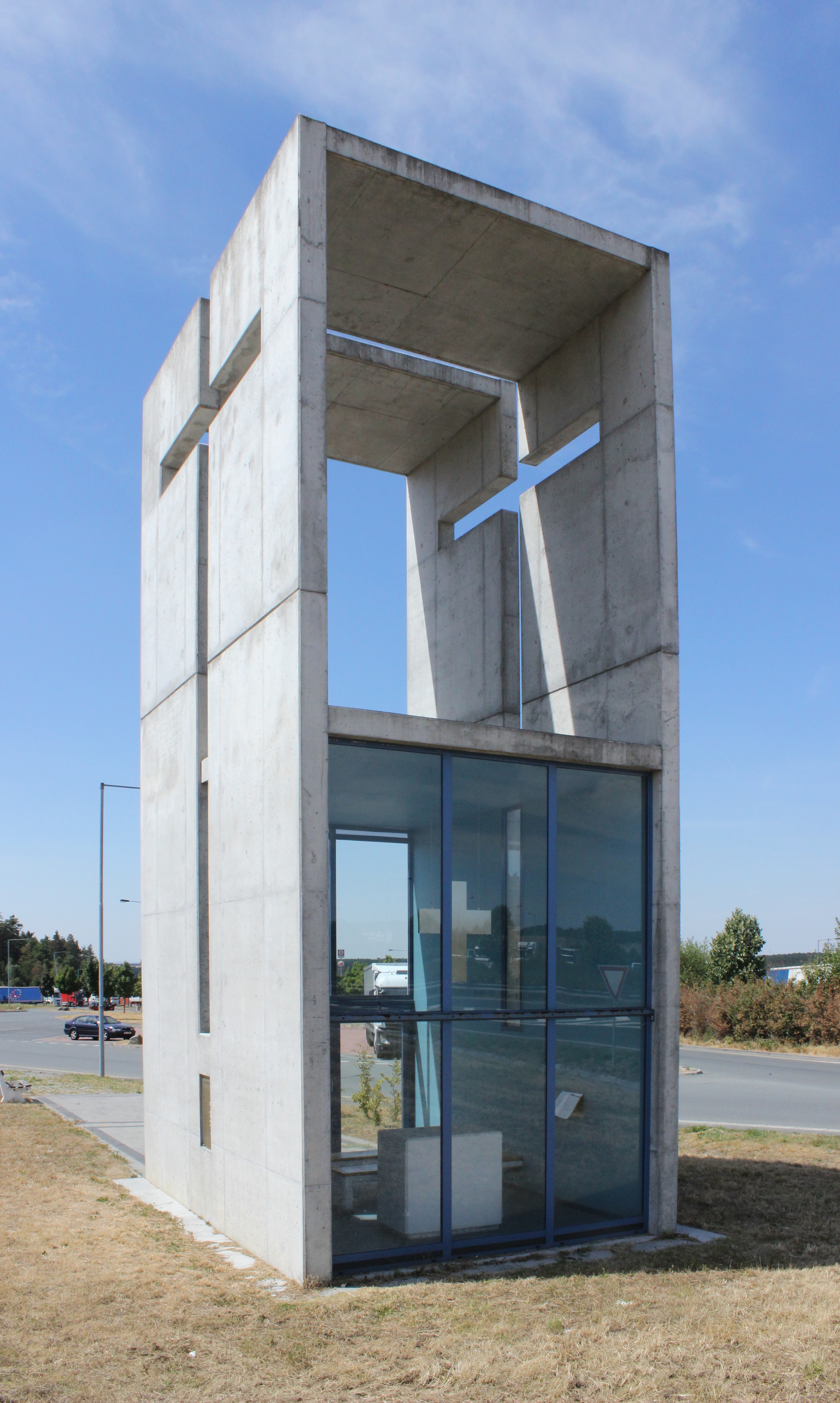 Pohled od východu na dálniční kapli u Šlovic.